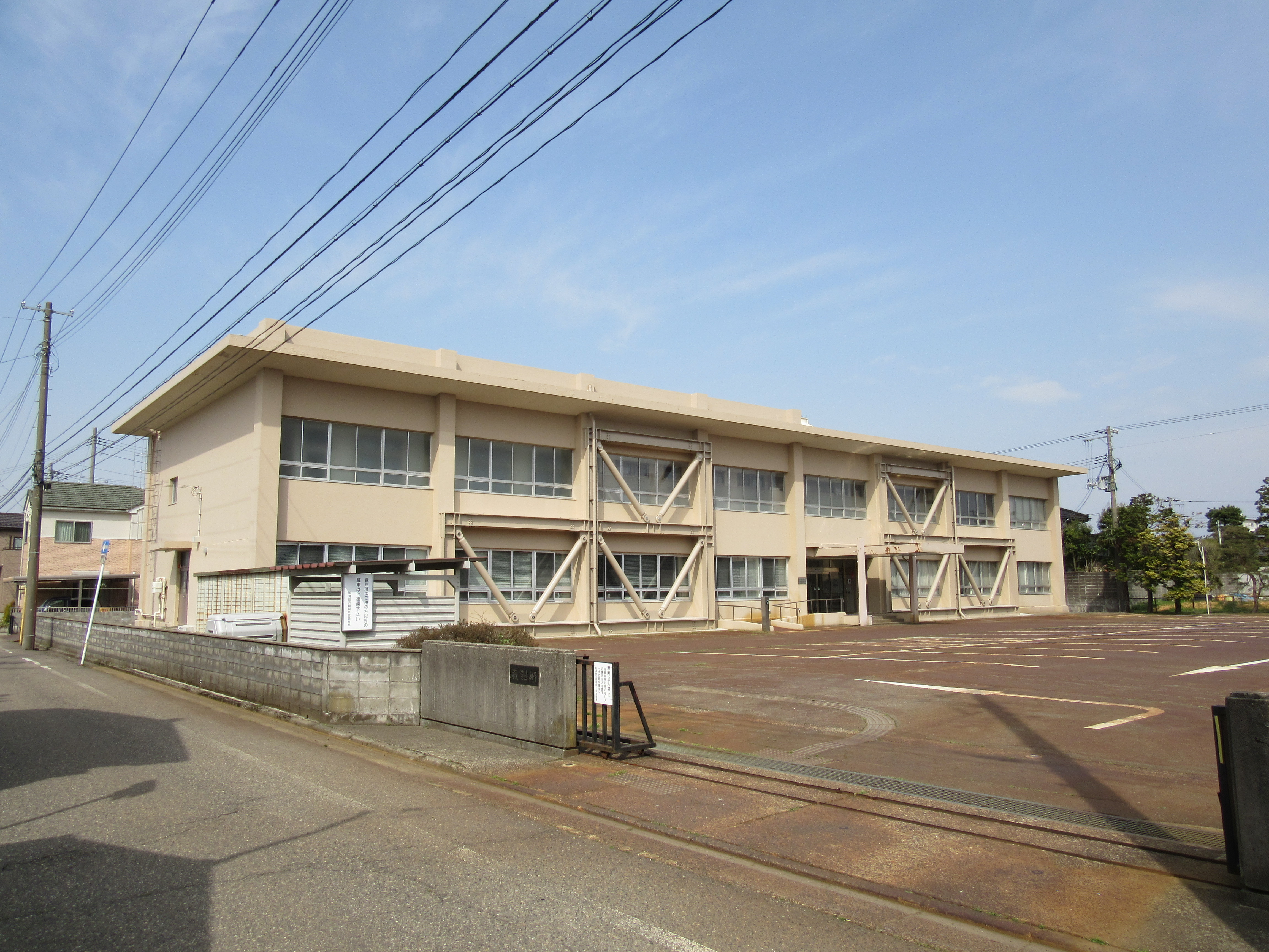 三条簡易裁判所